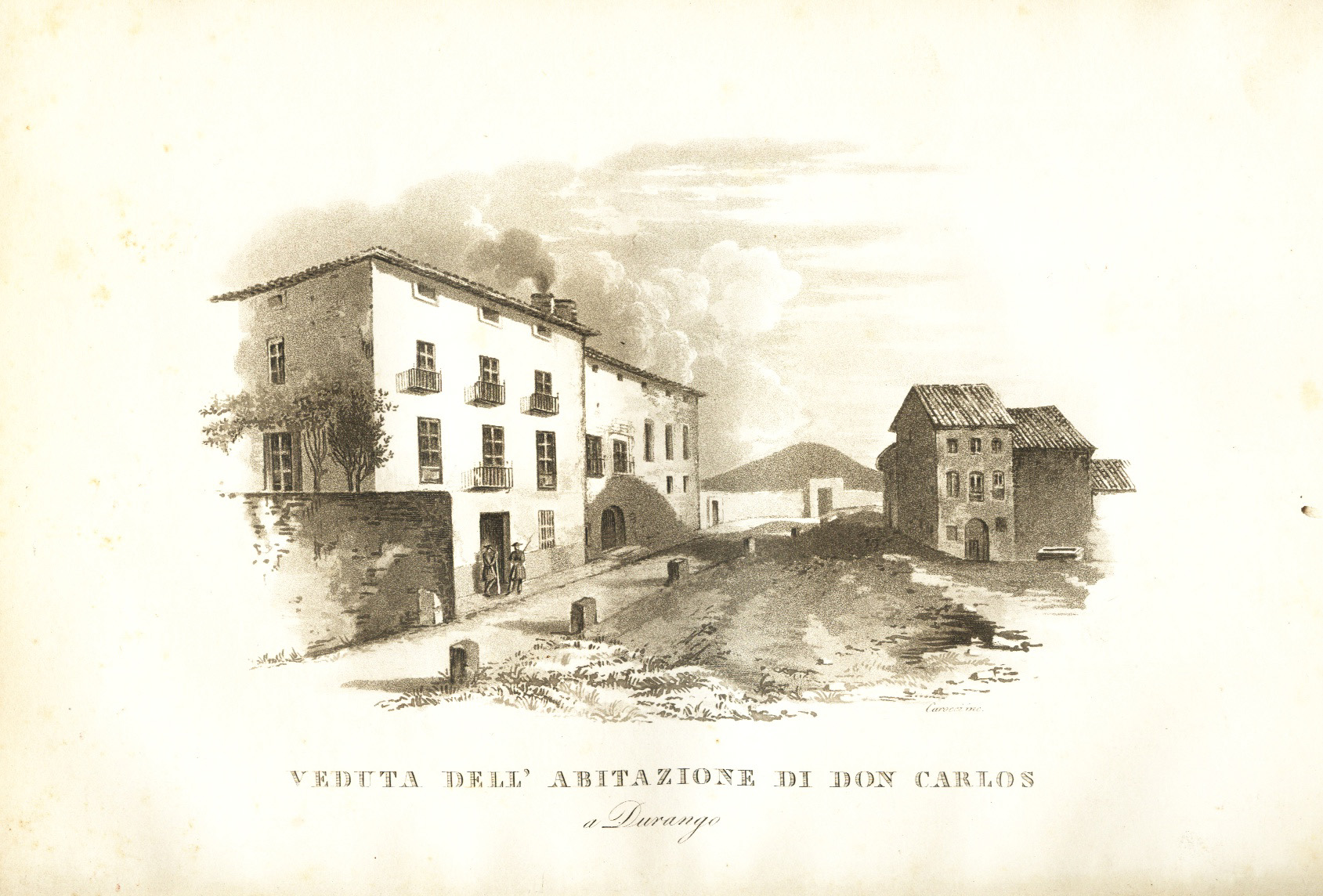 Residencia de Don Carlos en Durango. Dibujo de Isidoro Magués. "Don Carlos e i suoi difensori". Firenze 1837